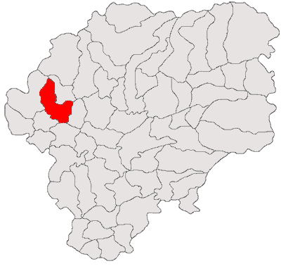 Categorie:Hărţi ale judeţului Bistriţa-Năsăud